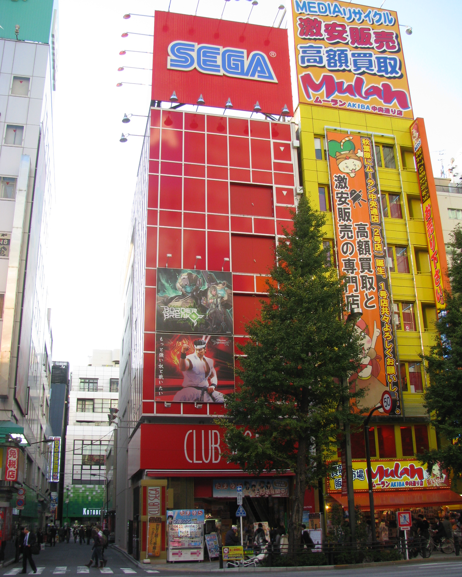 Amusement arcade CLUB SEGA Akihabara Annex. 1-11-11 Soto-kanda, Chiyoda, Tokyo.